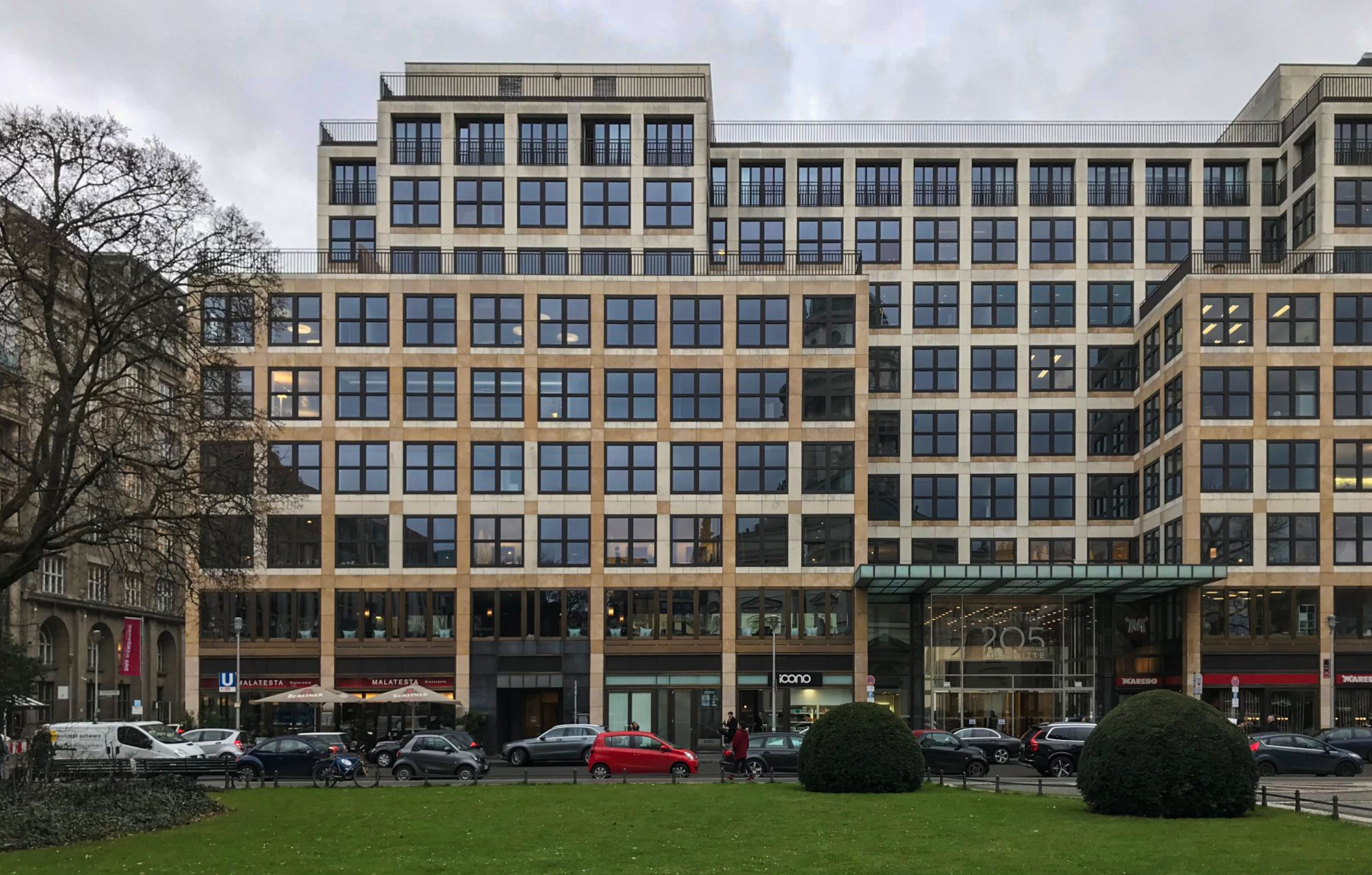 Rückseite des Quartiers 205 in Berlin-Mitte